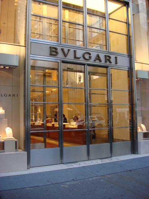 see title